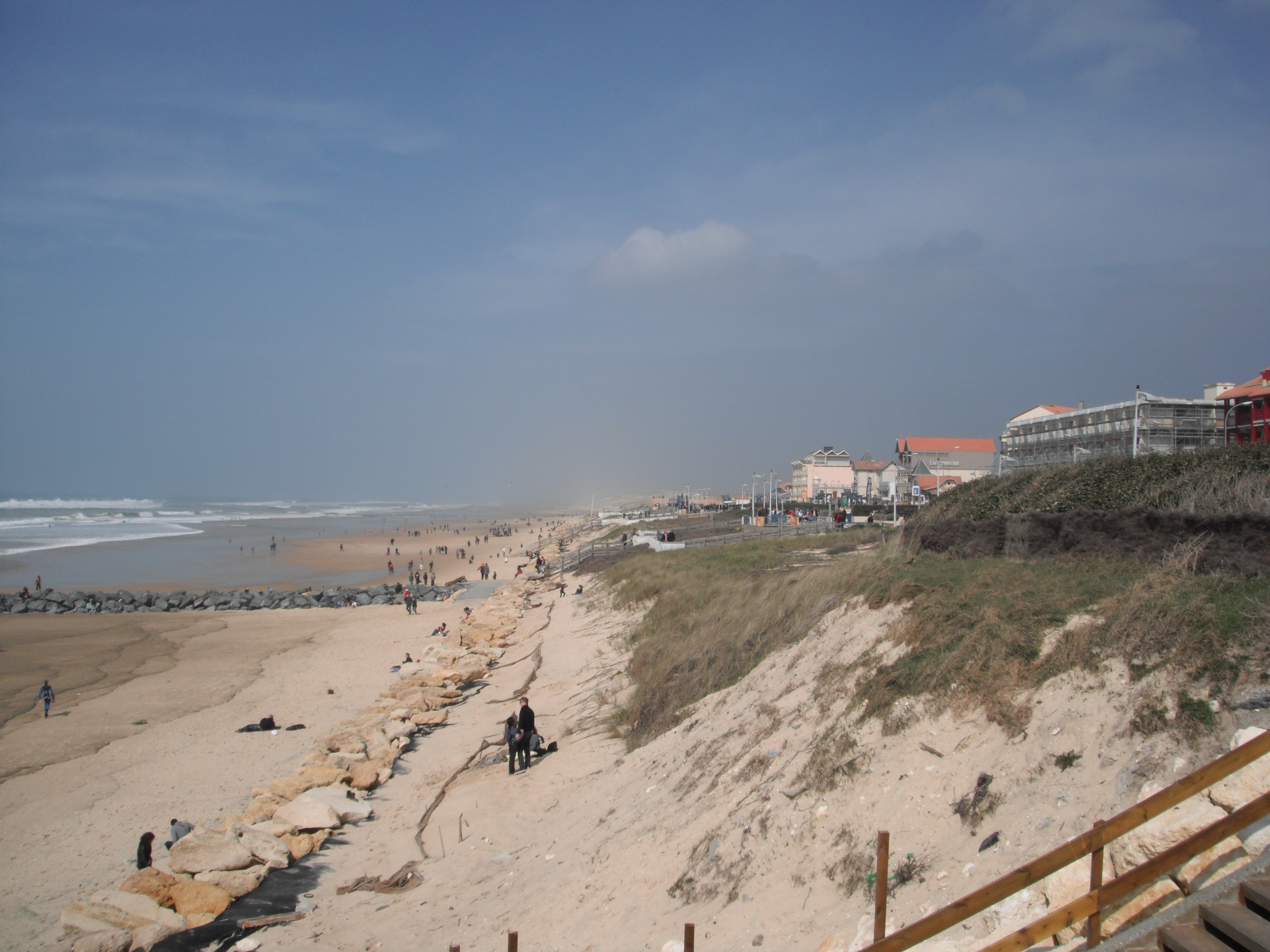 Plage - Lacanau-Océan (Gironde, France)